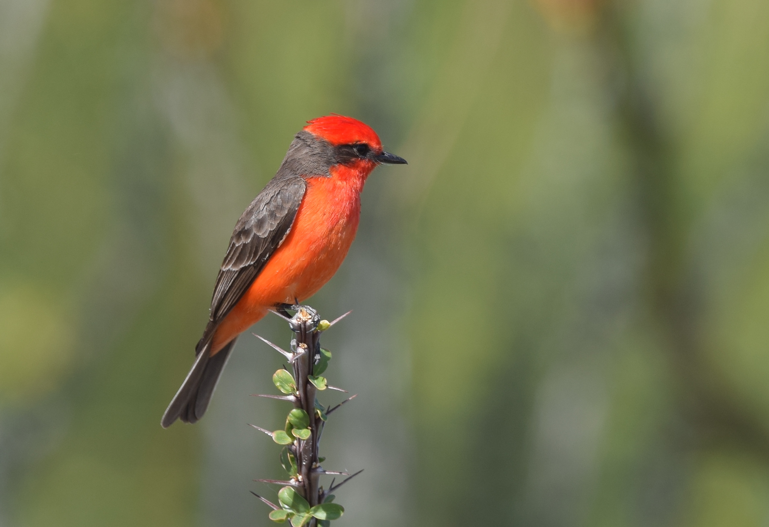 4/5/17 Arizona Day 8 (last day)